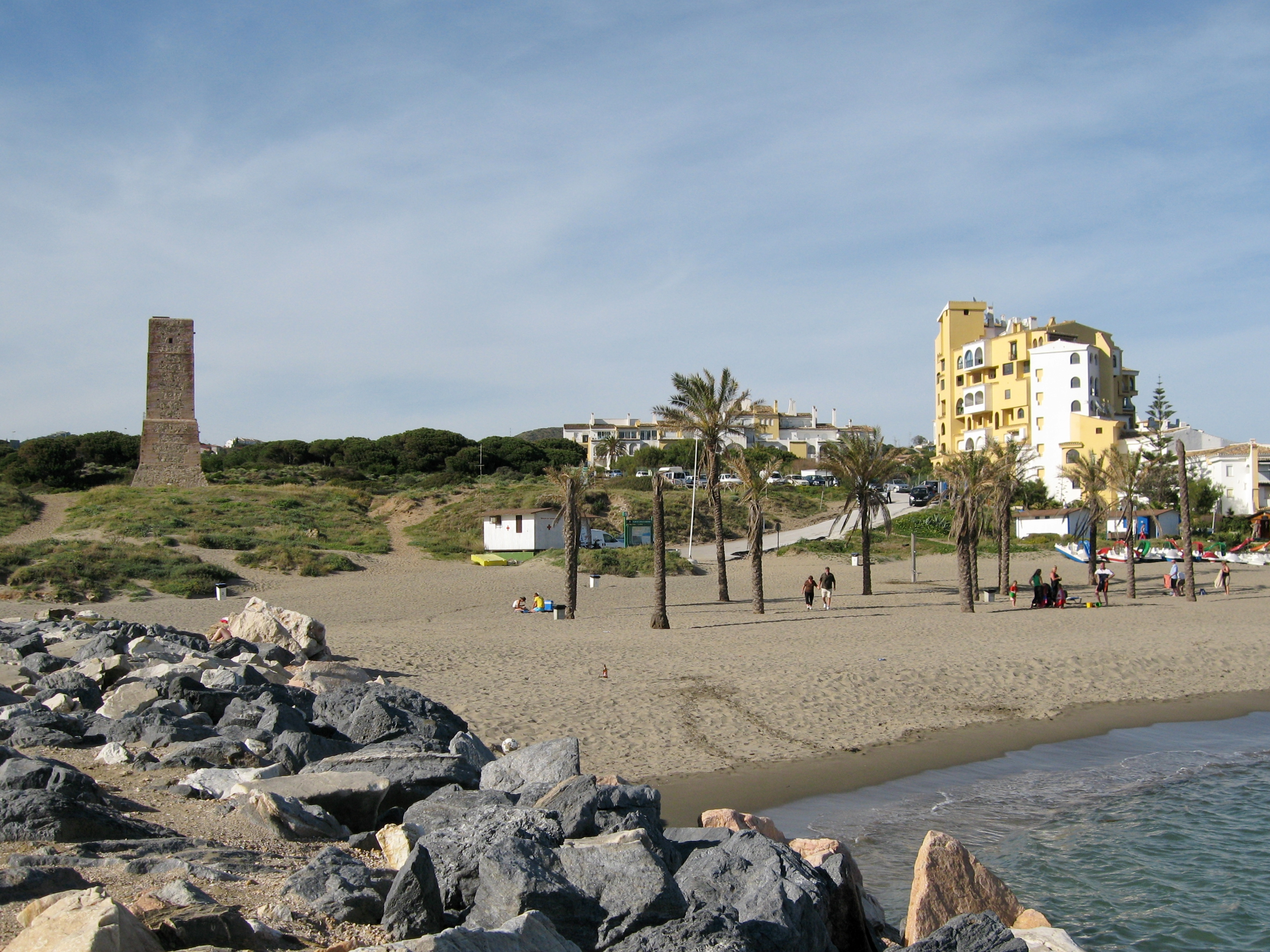 Cabopino, Ortsteil von Marbella, Provinz Málaga, Andalusien, Spanien